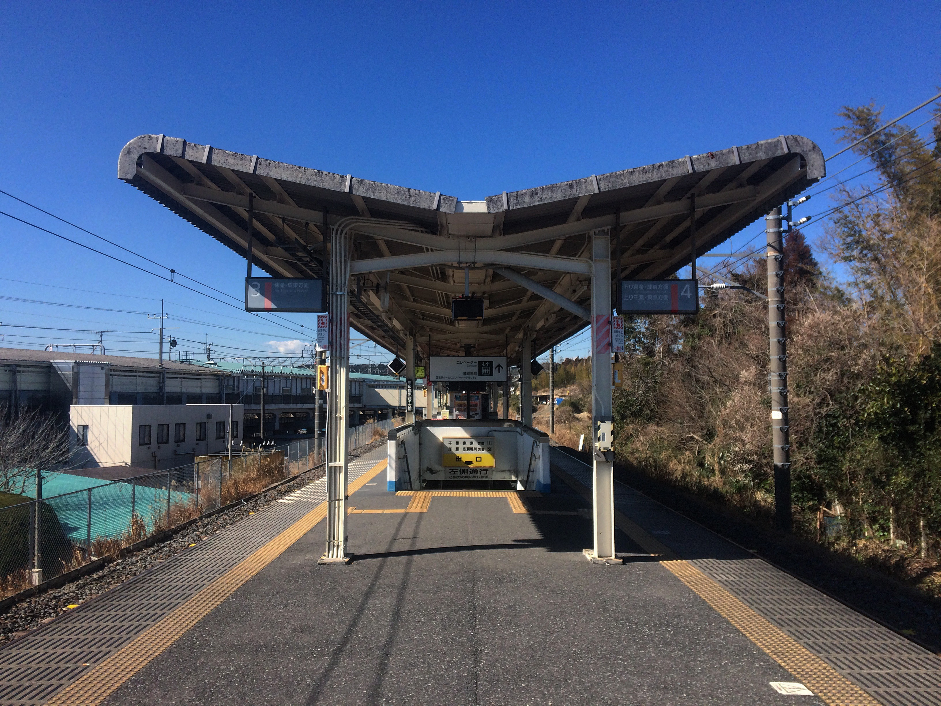 大網駅 東金線ホーム3.4番線